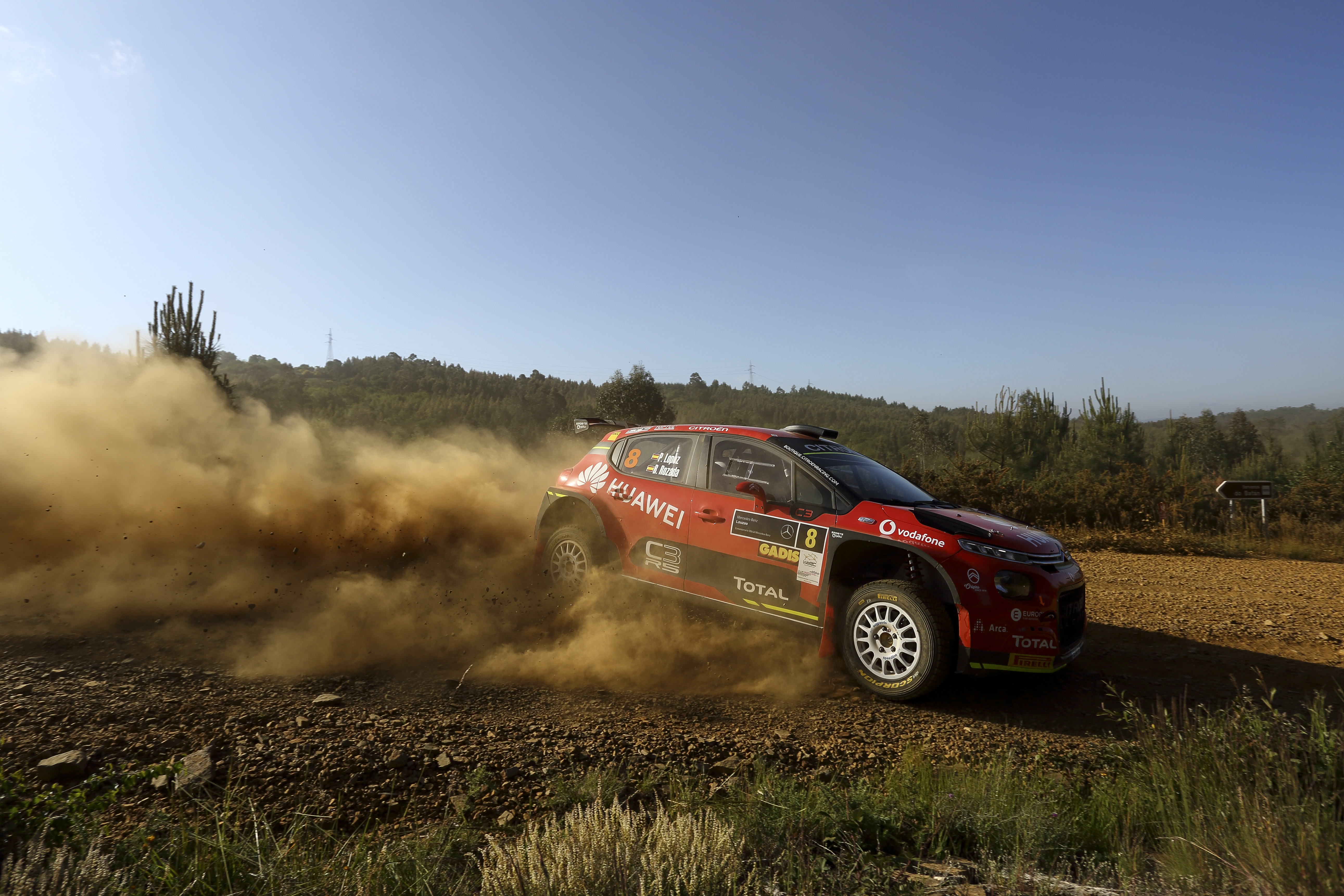 Rally Terra da Auga 2019, sería prueba puntuable para el SCER y CERT, donde Xevi Pons junto a Rodrigo Sanjuán con su Skoda Fabia R5, lograría la victoria que les permitiría volver a ser lideres del Supercampeonato.